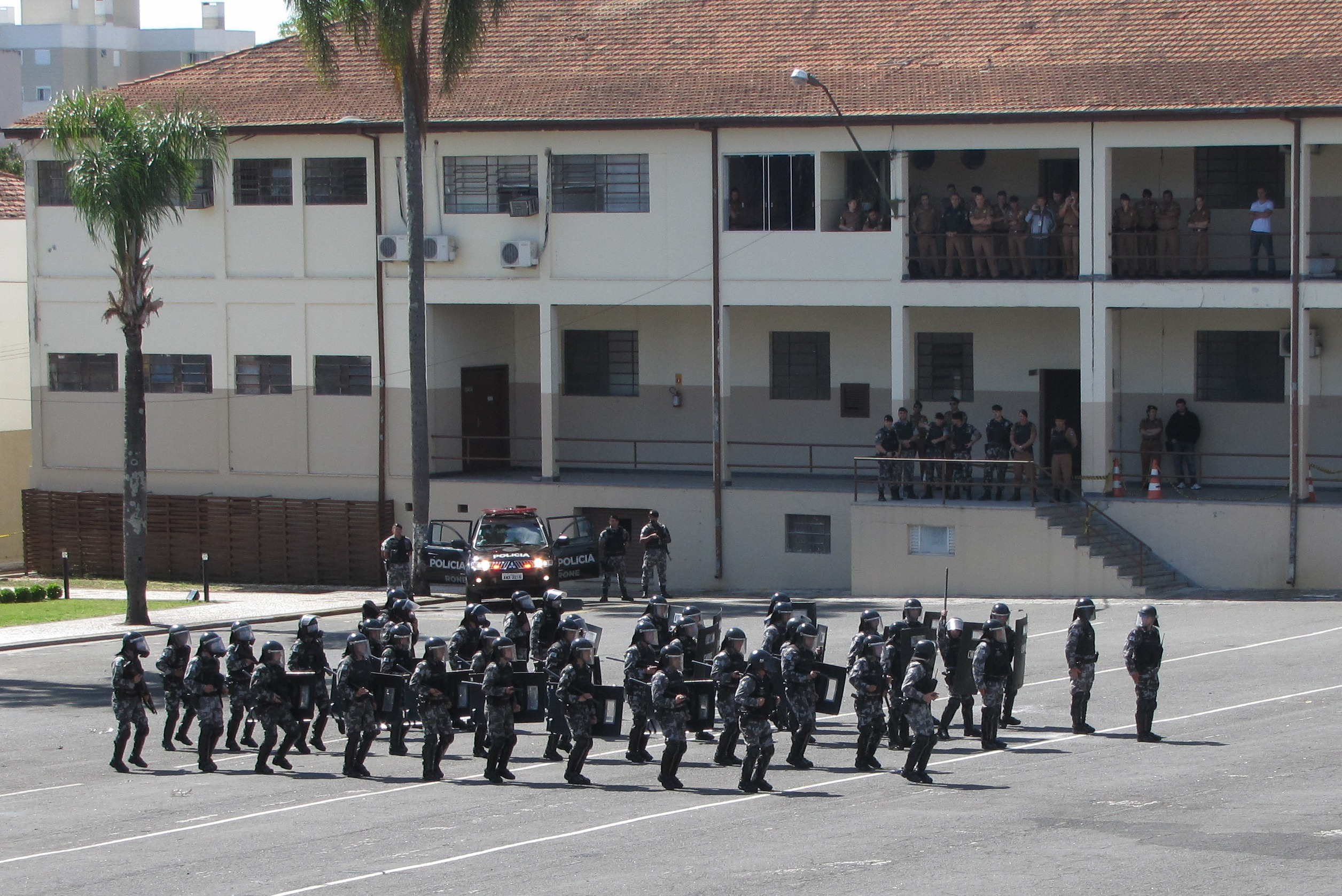 Grupo de Controle de Distúrbios Civis do Batalhão de Operações Especiais da PMPR.